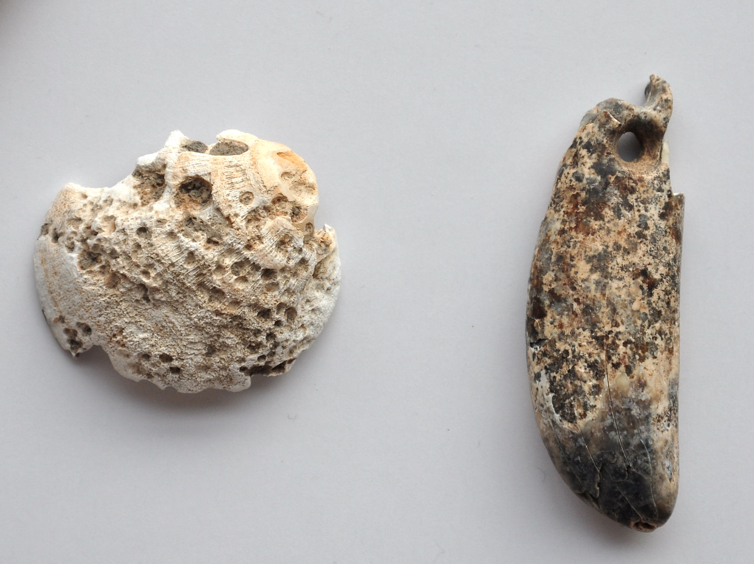 Steinplattengrab (erste Hälfte 3. Jahrtausend v.Chr.) einer etwa 35-jährigen Frau in Kempraten (Switzerland) : Beigaben in Form von drei Bären- und zwei Hunde-Eckzähnen, vier Schalen von Meermuscheln (alle durchlocht, vermutlich gehörten sie zu einer Kette) sowie eine Ahle aus Knochen